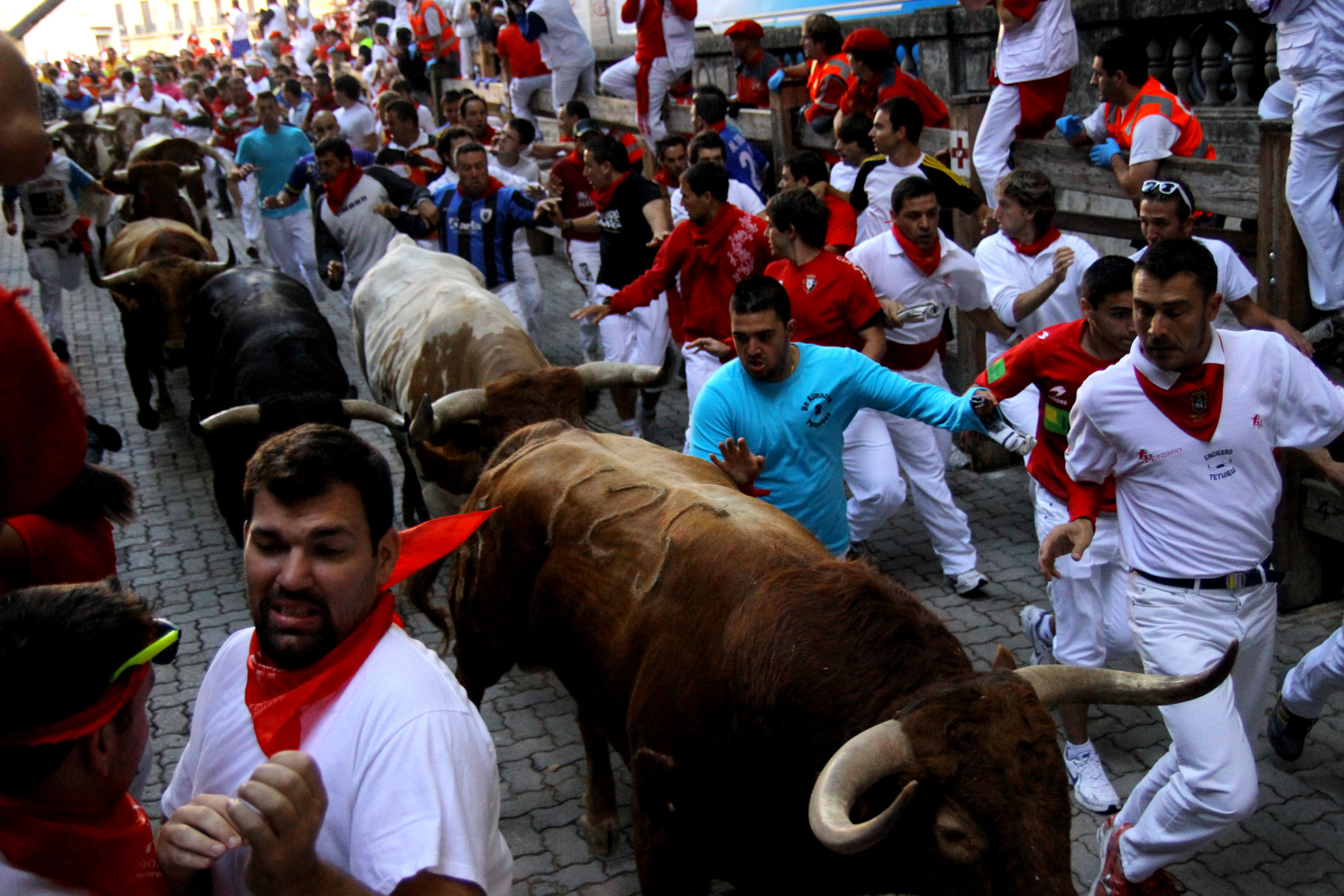 Los toros piden paso